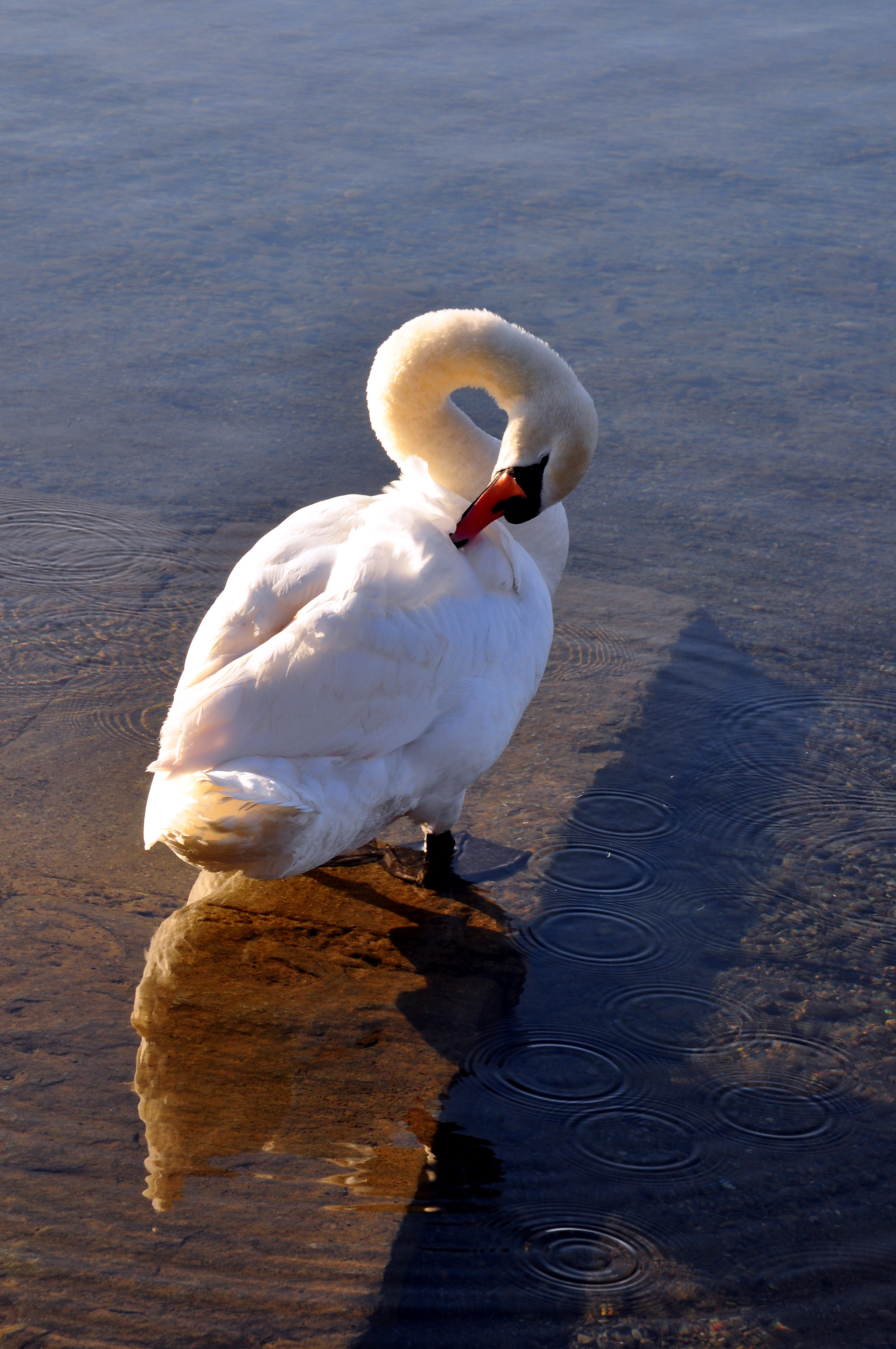 Cygnus olor, Pfäffikersee (Lake Pfäffikon) at the lido (Strandbad) in Auslikon (Switzerland)